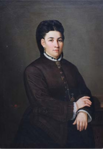 Boieroaica, ulei/pânză, 114x82cm, semnat și datat lateral stânga cu roșu 1876 D. Mihail, pe verso eticheta originală, caligrafiată manual F. Priessler - poleitor, București 1895 - Colecție privată